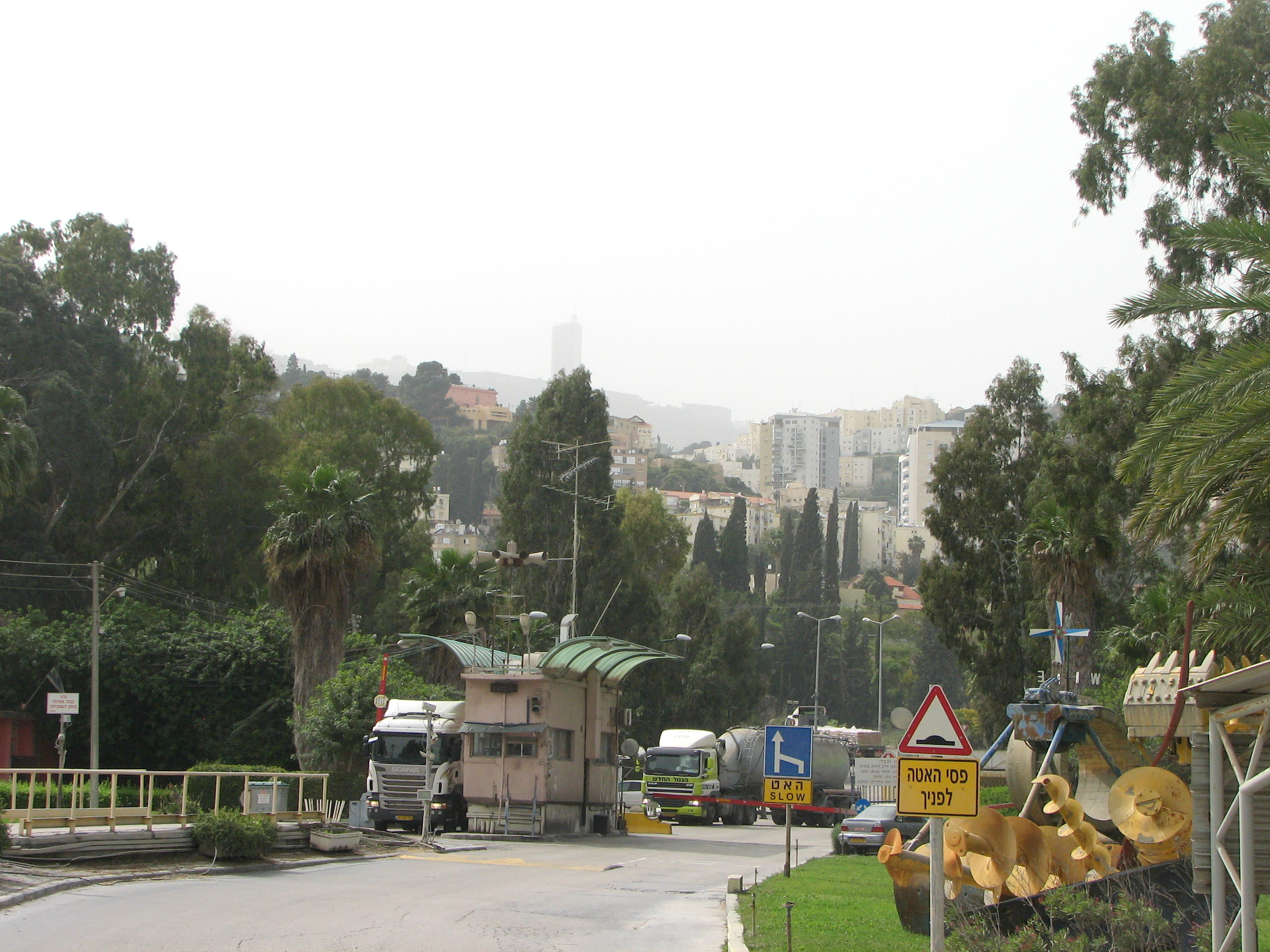 Nesher Nesher Israel Cement Enterprises in the city Nesher Israel. The factory was astablished in 1925 בית החרושת למלט בנשר- היום שמו נשר מפעלי מלט ישראליים נרשם ב- 1922 . בשנים לאחר מיכן הוקם באזור נשר . הכבשן הראשון הופעל באוקטובר 1925 מבט על שכונות רמות יצחק מימין וגבעת נשר משמאל מתוך מפעל נשר